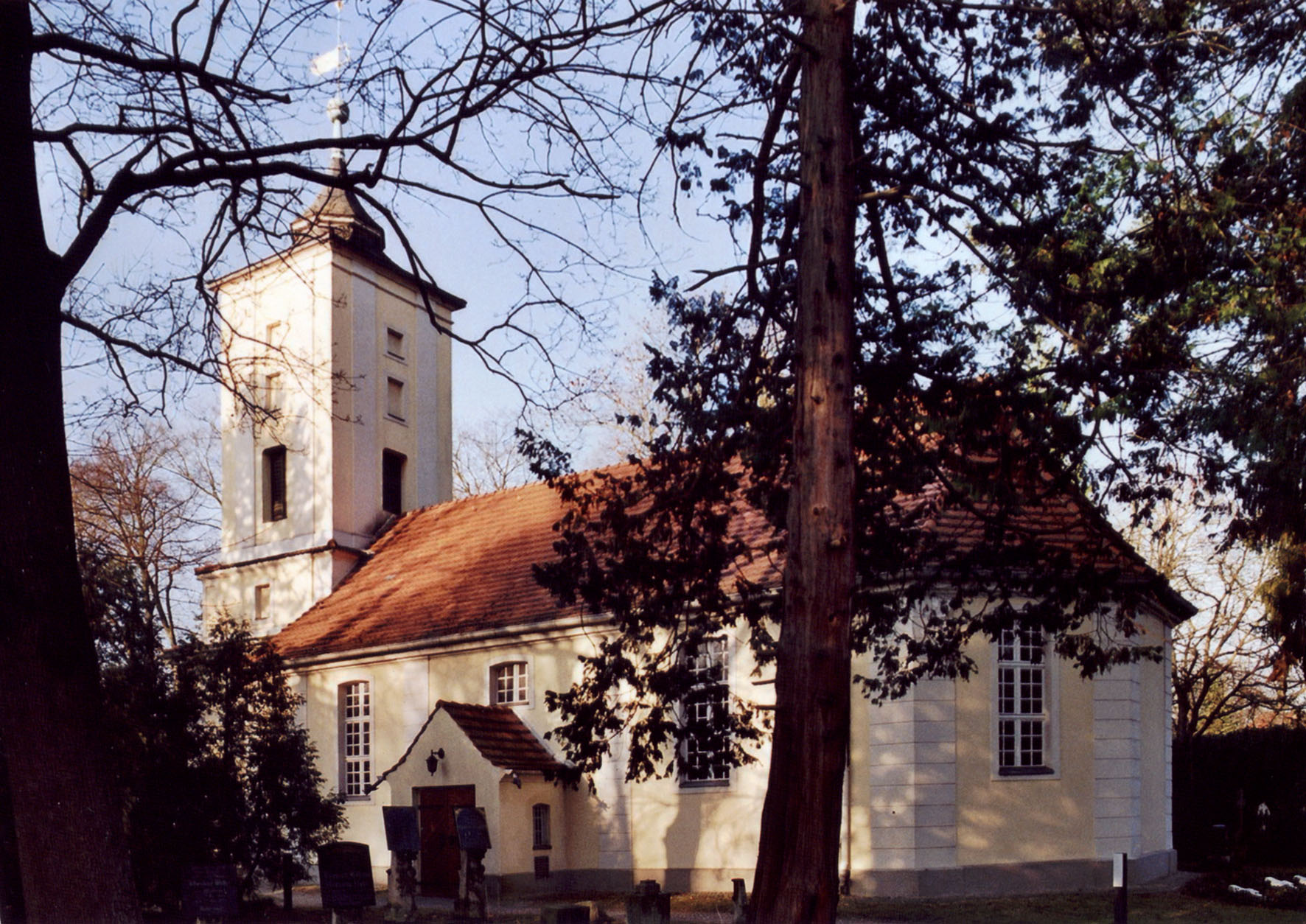 Dorfkirche auf dem Dorfanger, Kirchenschiff aus dem 15./16. Jahrhundert